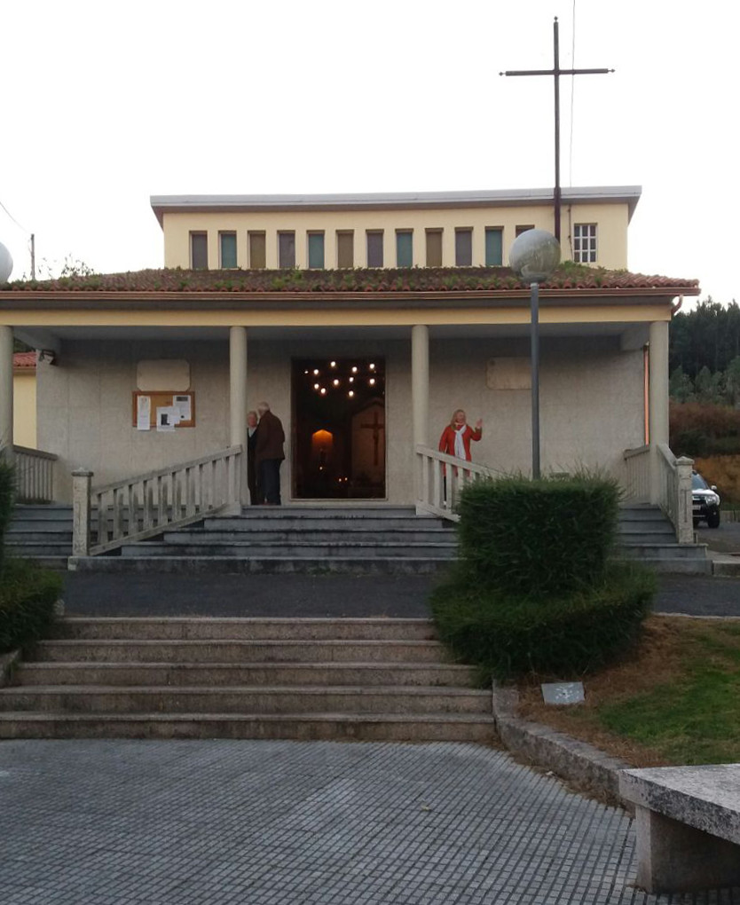 Iglesia nueva de Erbecedo